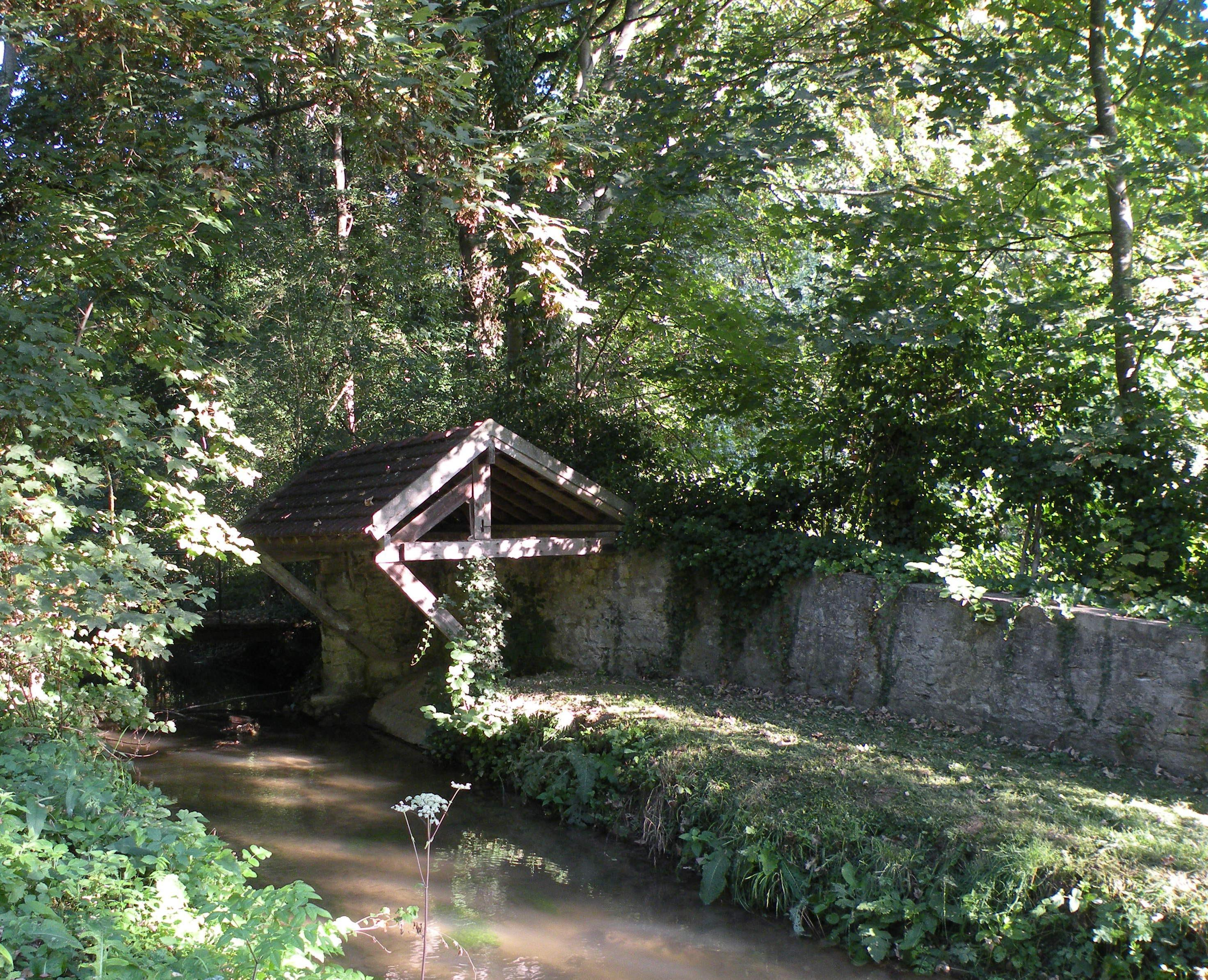 lavoir du pont de l'arche de Vallangoujard